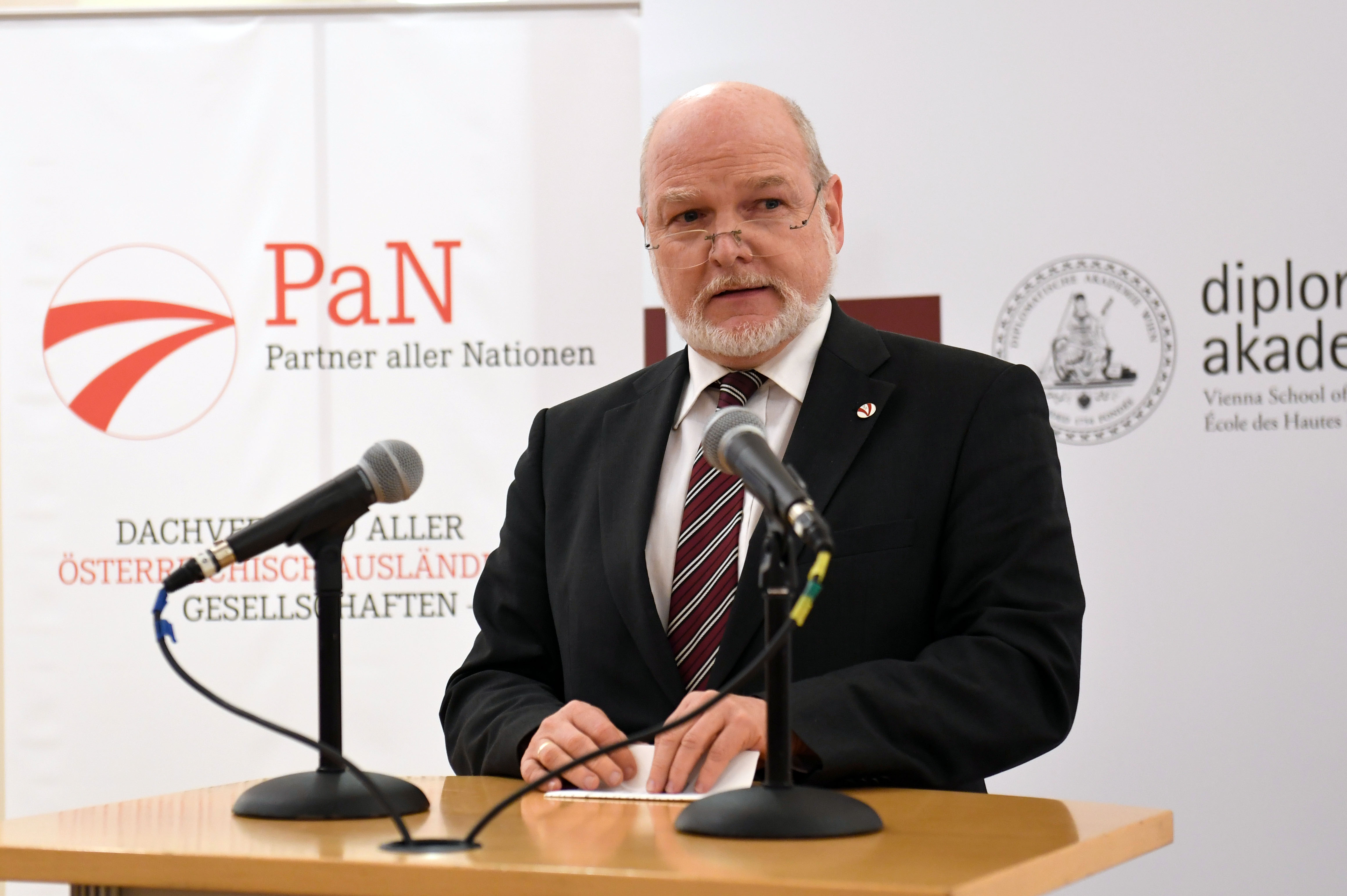 Univ.-Prof. Dr. Hermann Mückler, Präsident der PaN-Gesellschaft